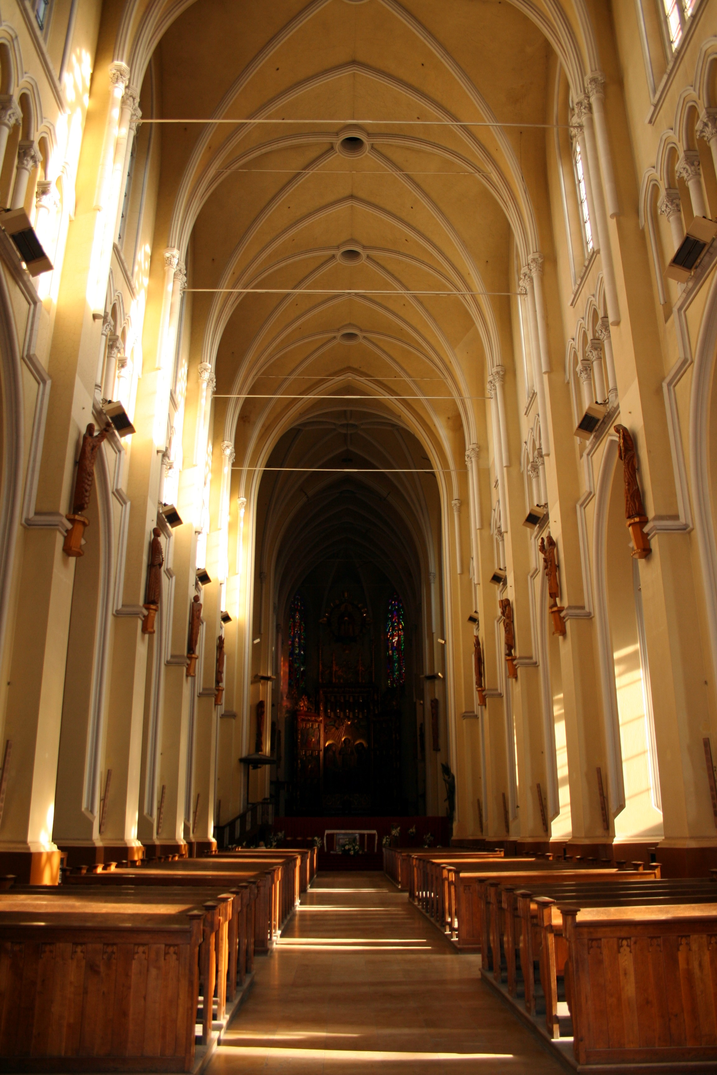 Archikatedra św. Rodziny w Częstochowie - wnętrze